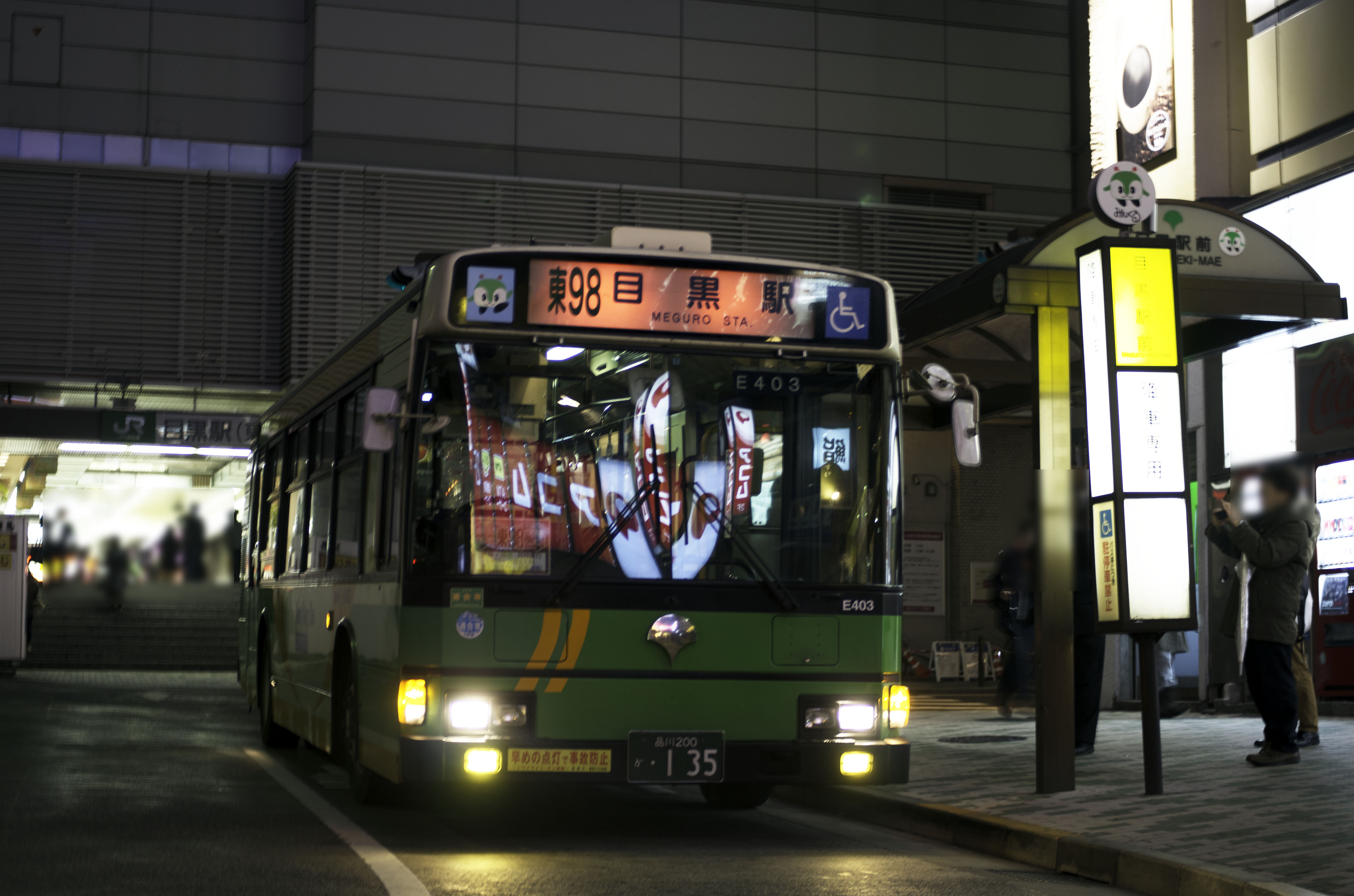 日野KC-HU2PMCE Y-E403 都営バス東98系統目黒駅行最終運行便